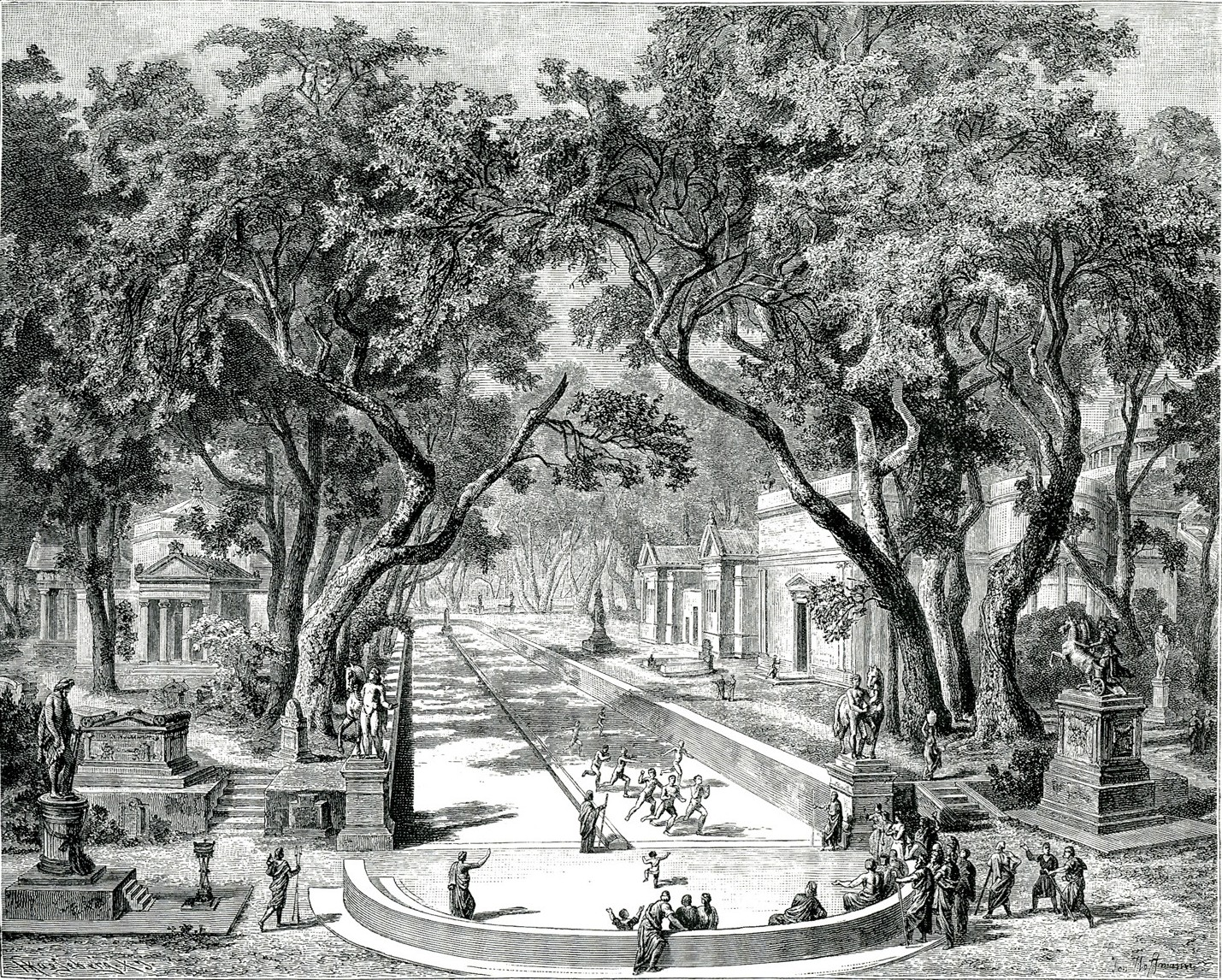 Ιάκωβος Φάλκε. Ελλάς, ο Βίος των Αρχαίων Ελλήνων. Κατά το γερμανικό του Ιακώβου Φάλκε, Ν. Γ. Πολίτης (μετ.), Αθήνα, Κάρολος Βίλμπεργκ, 1887